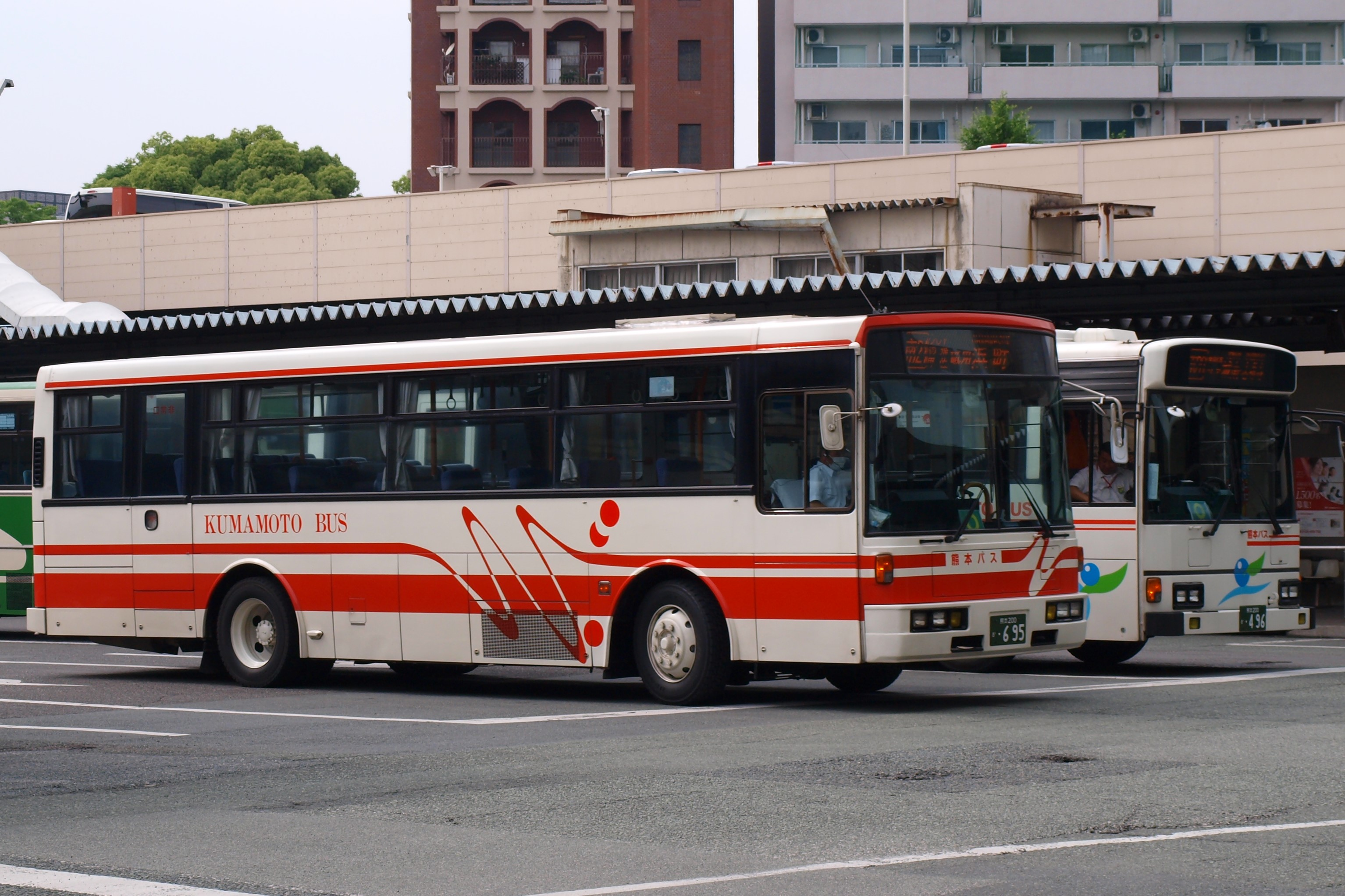 いすゞ・キュービック（富士重工17E型架装車、KC-LV380L、元京浜急行バス）と日野・ブルーリボン（U-HT2MMAA、元阪東自動車）、熊本バスで使用されるもの（熊本交通センターで撮影）